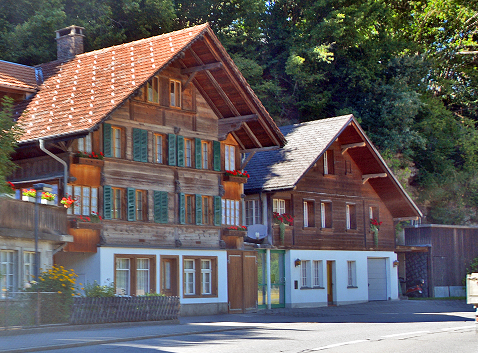 Weissenbach im Simmental, Bern